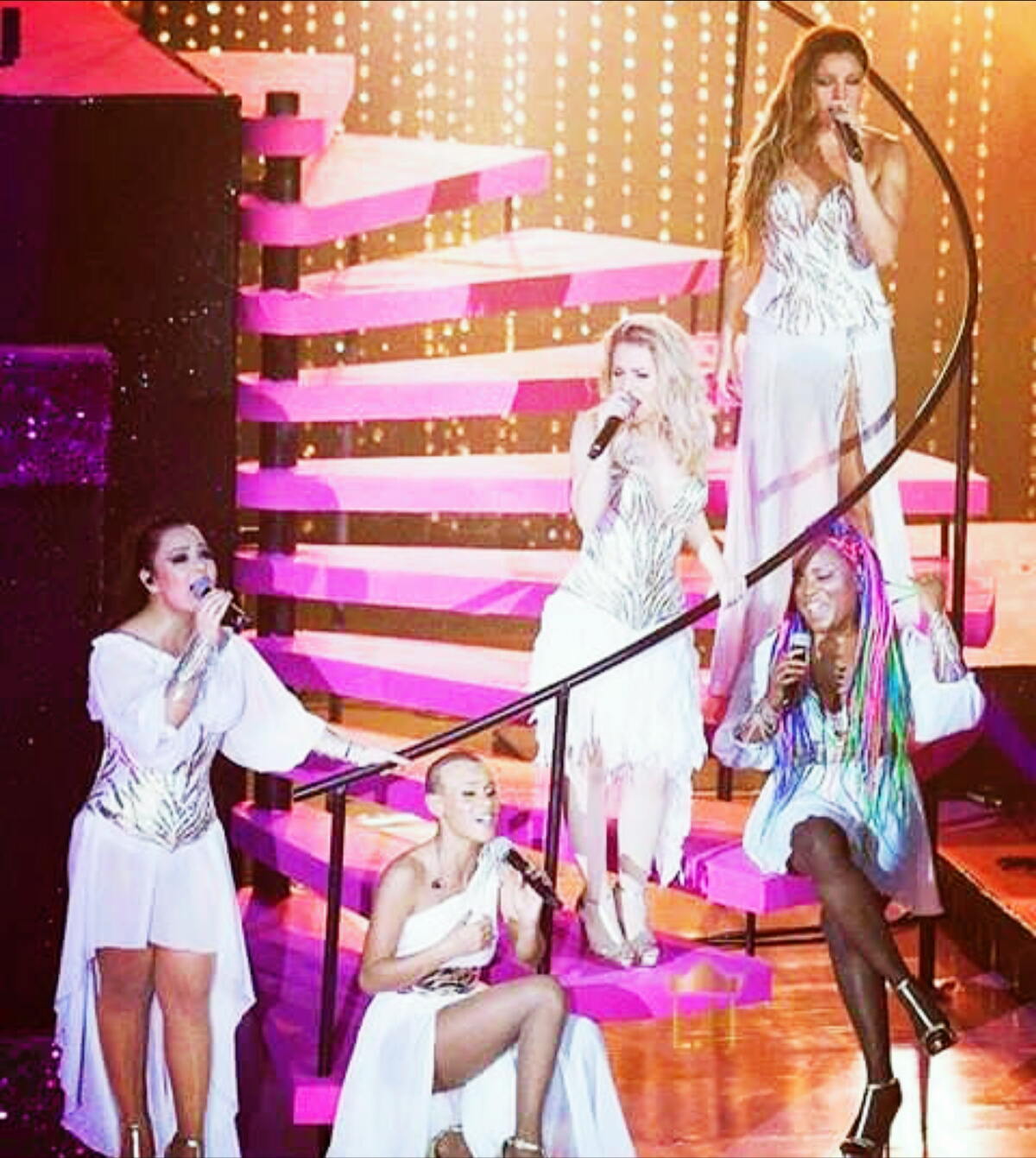 Chá Rouge no Rio de Janeiro, 2017.